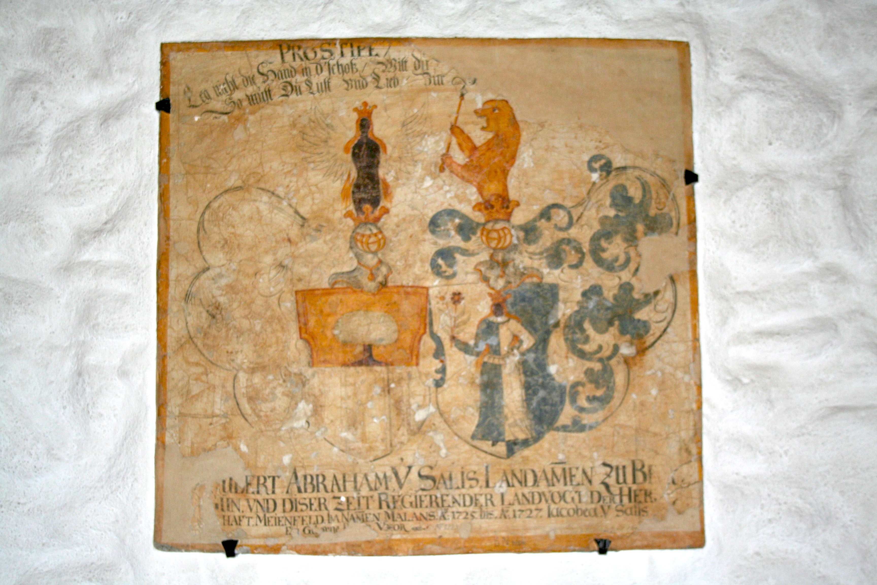 Schloss Brandis in Maienfeld: Wappen des Landvogts Gilbert von Salis im Rittersaal